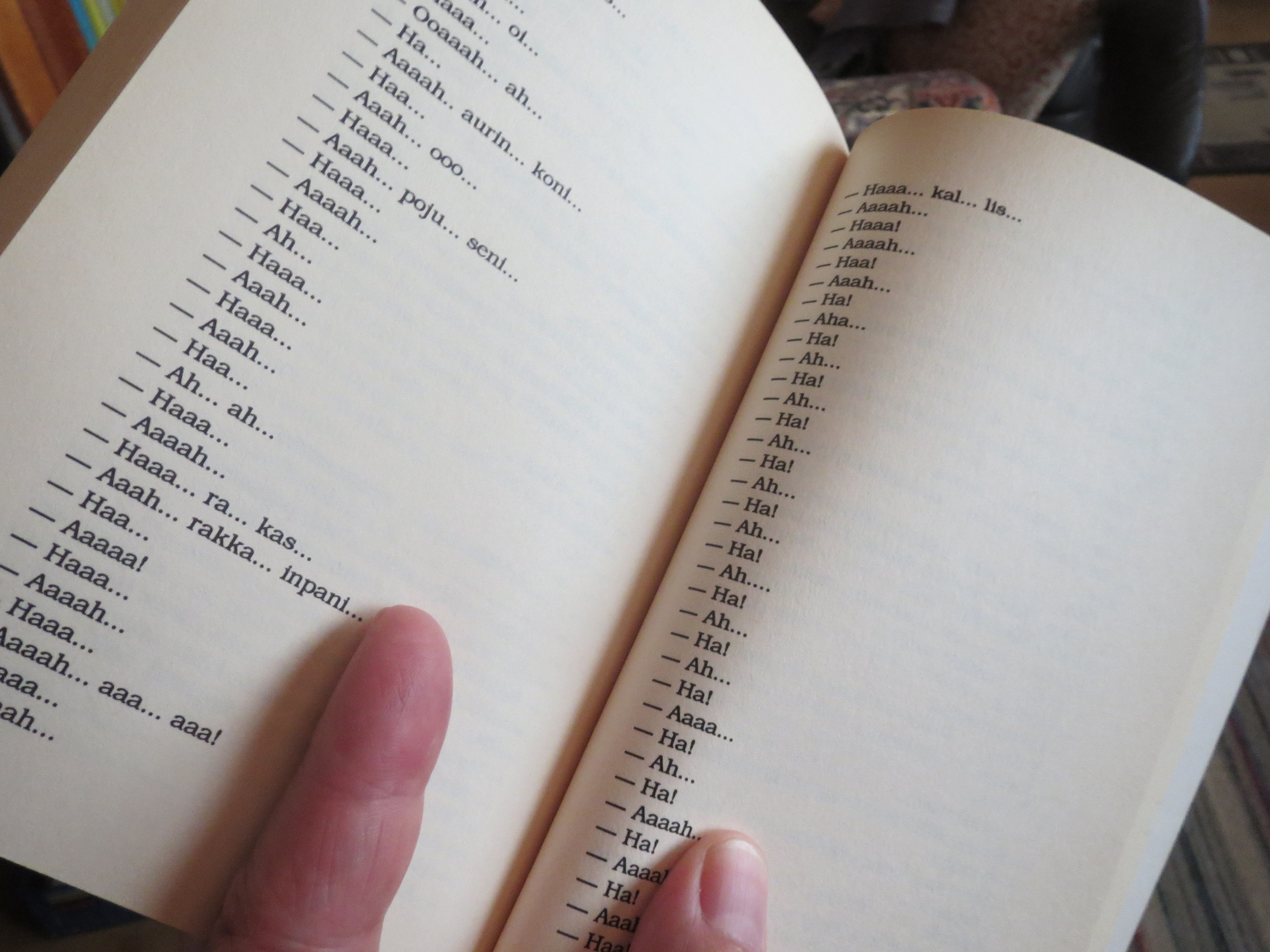 A user enjoying the Ochered in Finnish